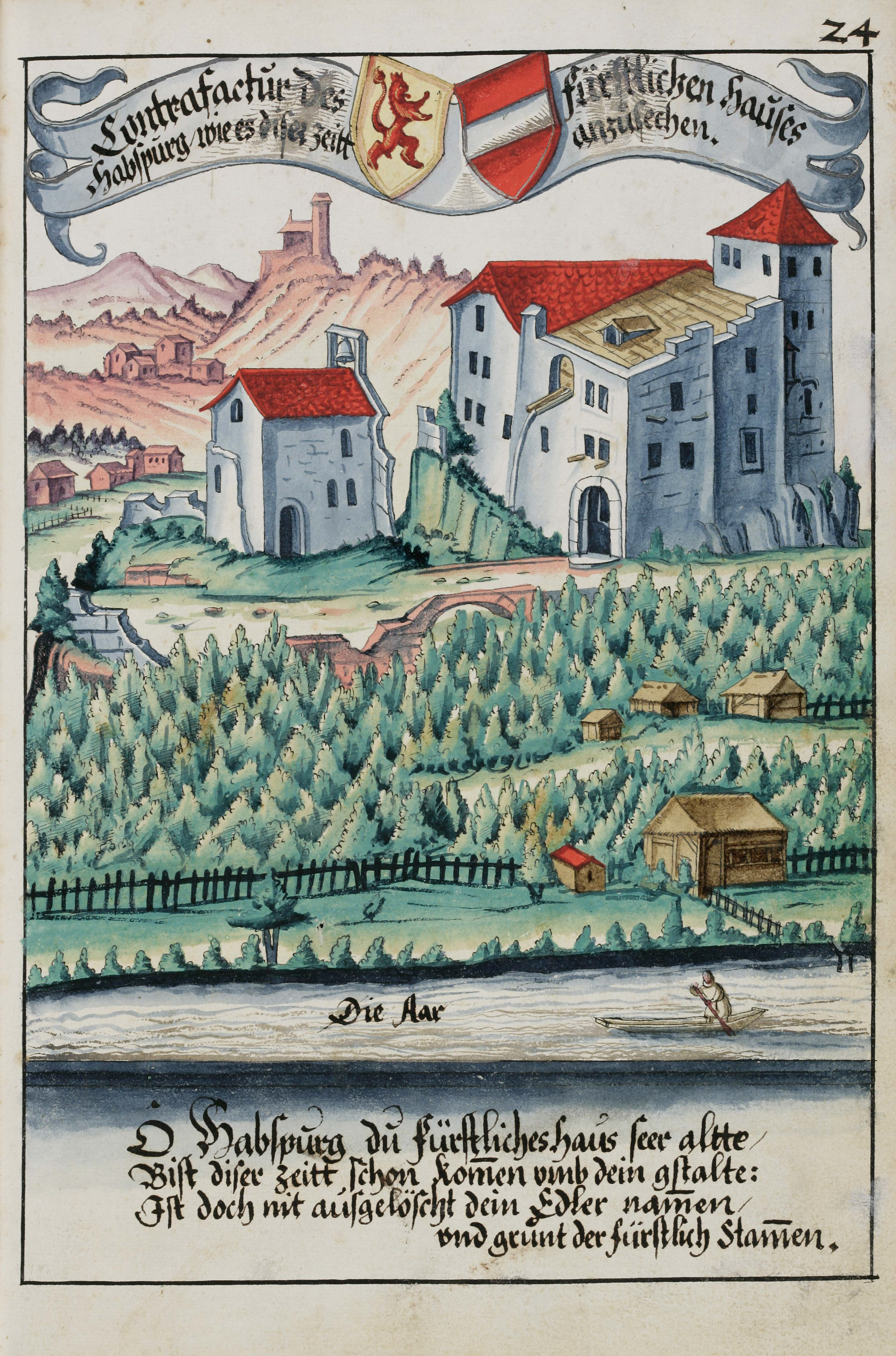 Wappenbuch des Hans Ulrich Fisch. Papier, 31.5 x 19.5 cm, Aarau 1627. Aarau, Staatsarchiv Aargau, V/4-1985/0001, fol. 24r